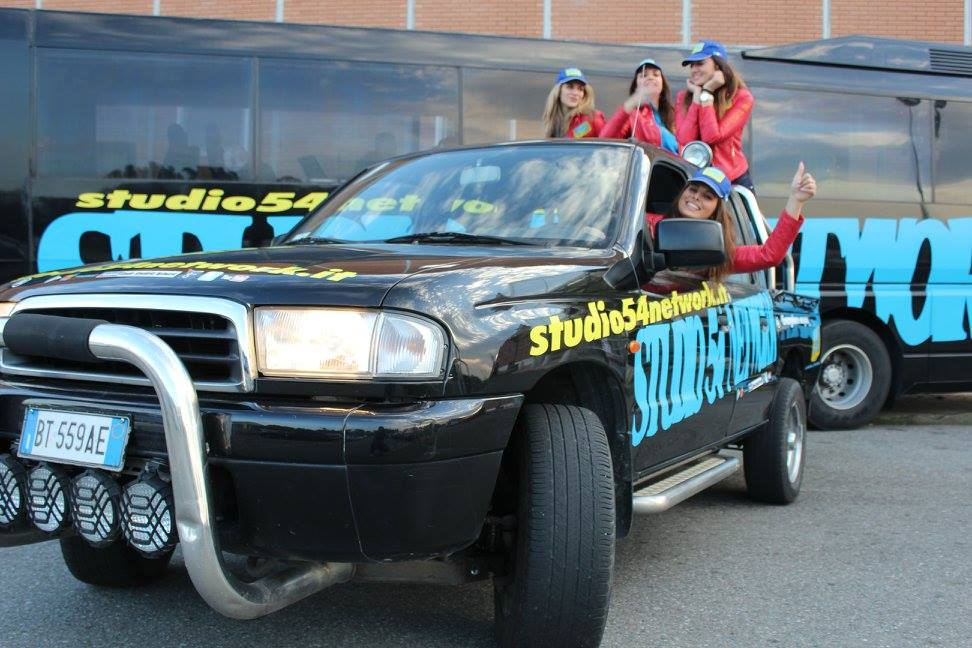 le Studio 54 Angels, front girl della radio